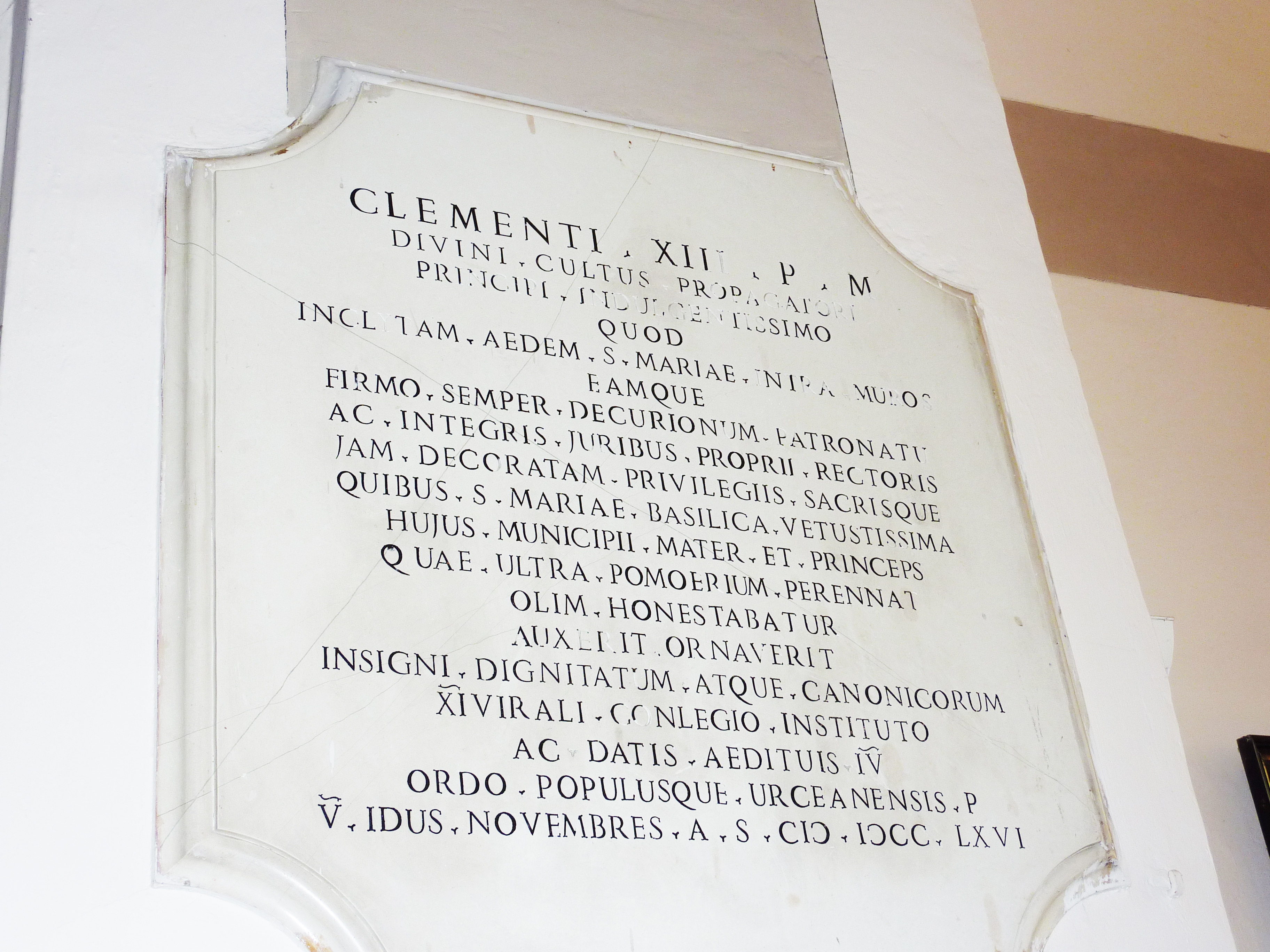 Lapide che attesta la promozione a Basilica Collegiata, interno della Chiesa di Santa Maria Novella di Orciano di Pesaro